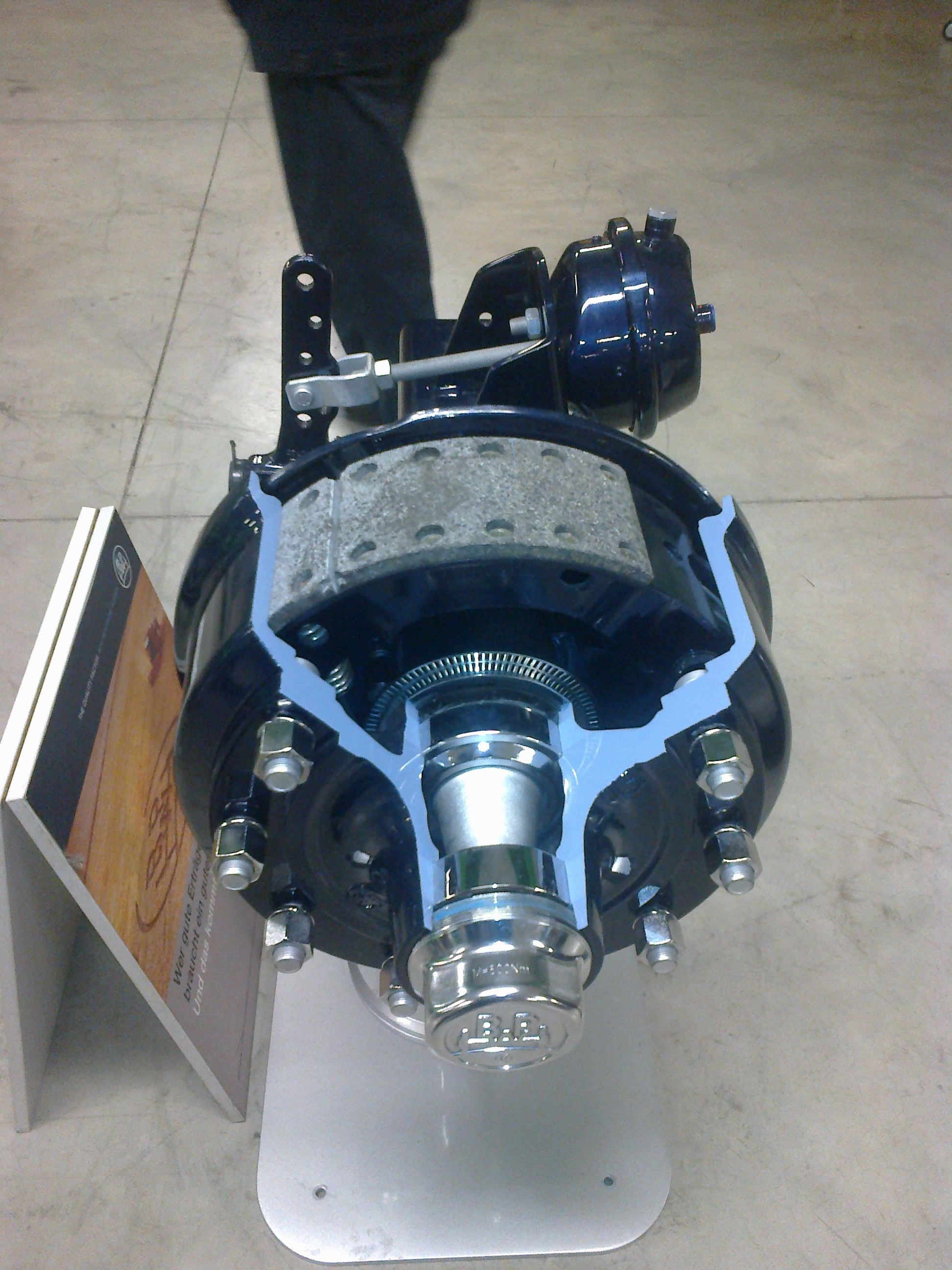 aufgeschnitte Achse von BPW zu Demonstrationszwecken